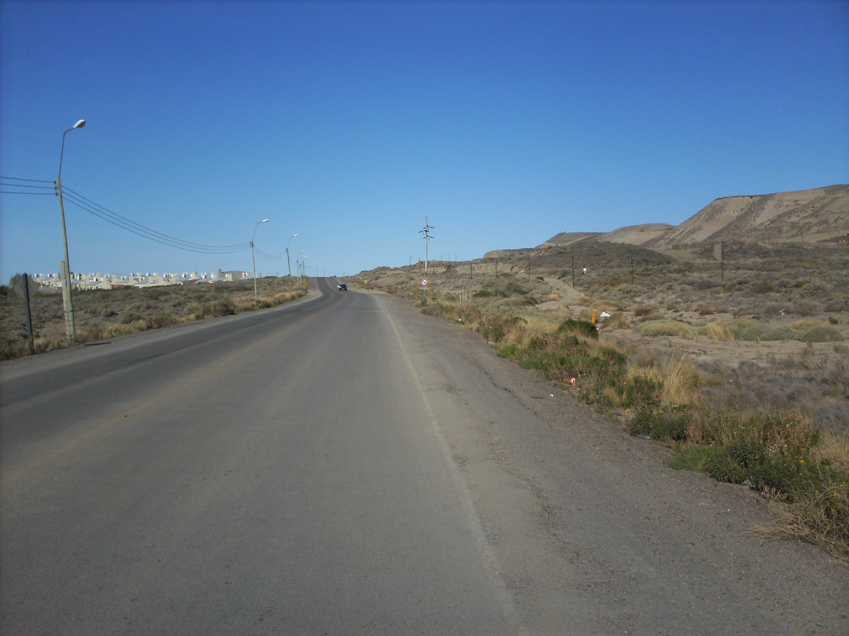 vista de la entrada al barrio sarmiento